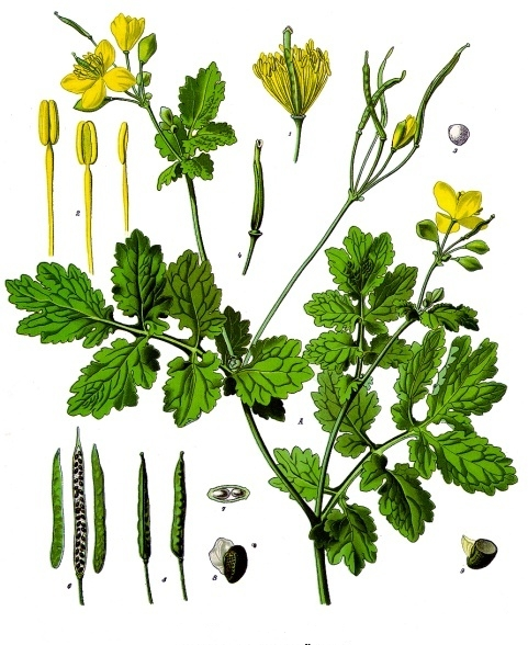 Schöllkraut. A Pflanze in natürl. Grösse; 1 innere Blüthe, vergrössert; 2 Staubgefässe von verschiedenen Seiten, desgl.; 3 Pollen, desgl.; 4 Stempel, desgl.; 5 geschlossene Frucht, natürl. Grösse; 6 geöffnete Frucht, desgl.; 7 Stempel im Querschnitt, desgl.; 8 Same, natürl. Grösse und vergrössert; 9 derselbe im Querschnitt, vergrössert.